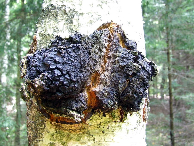 Inonotus obliquus. Karmėlava forest, Lithuania.